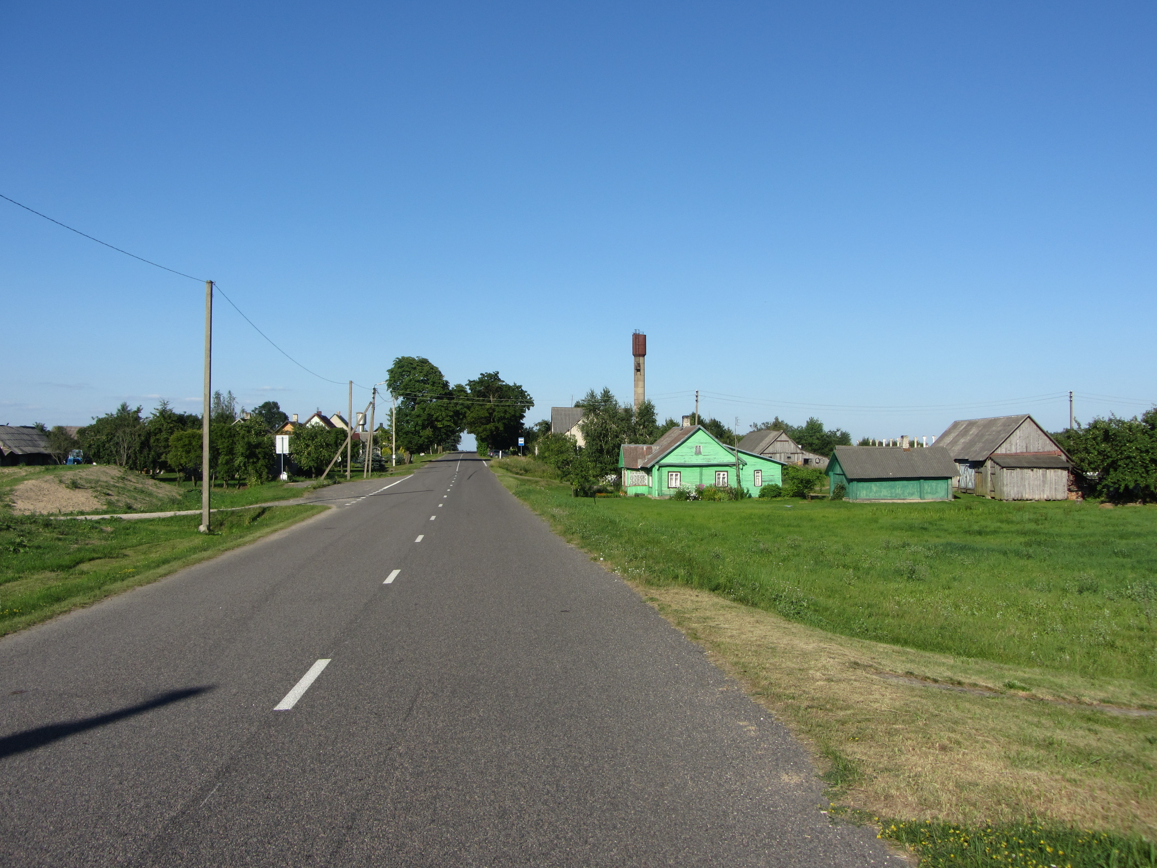 Avižonys 19131, Lithuania